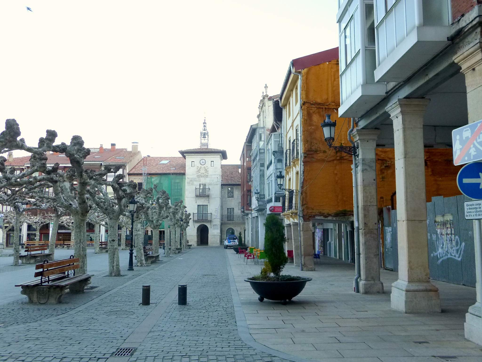 Briviesca - Plaza Mayor